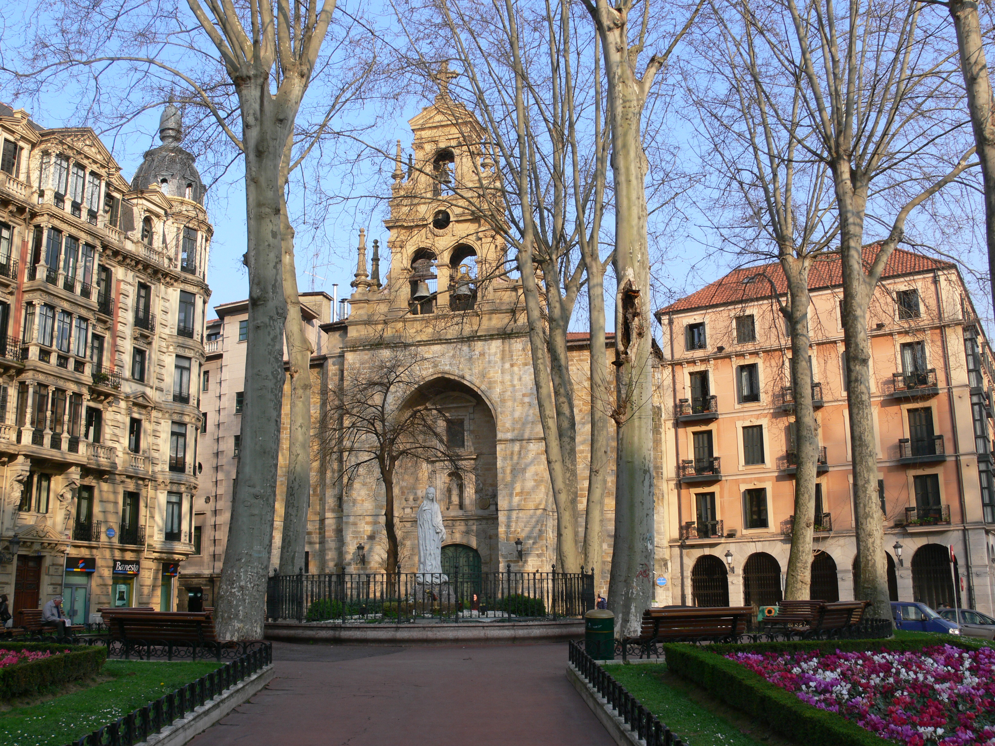 Iglesia de San Vicente Mártir de Abando; Jardines de Albia; Bilbao